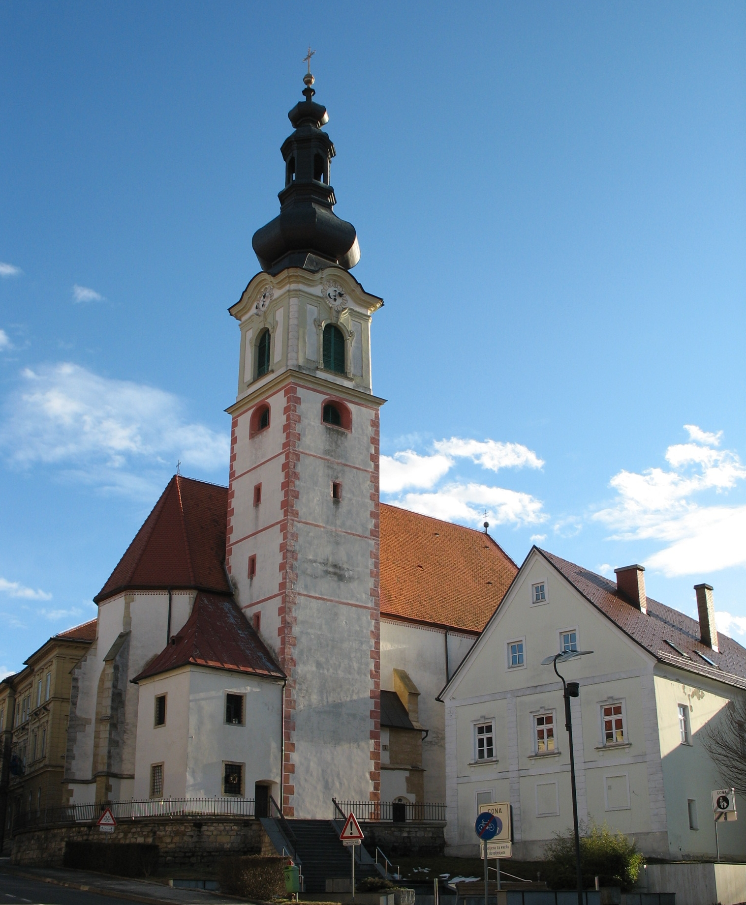 Cerkev Svetega Lenarta v Lenartu v Slovenskih goricah.